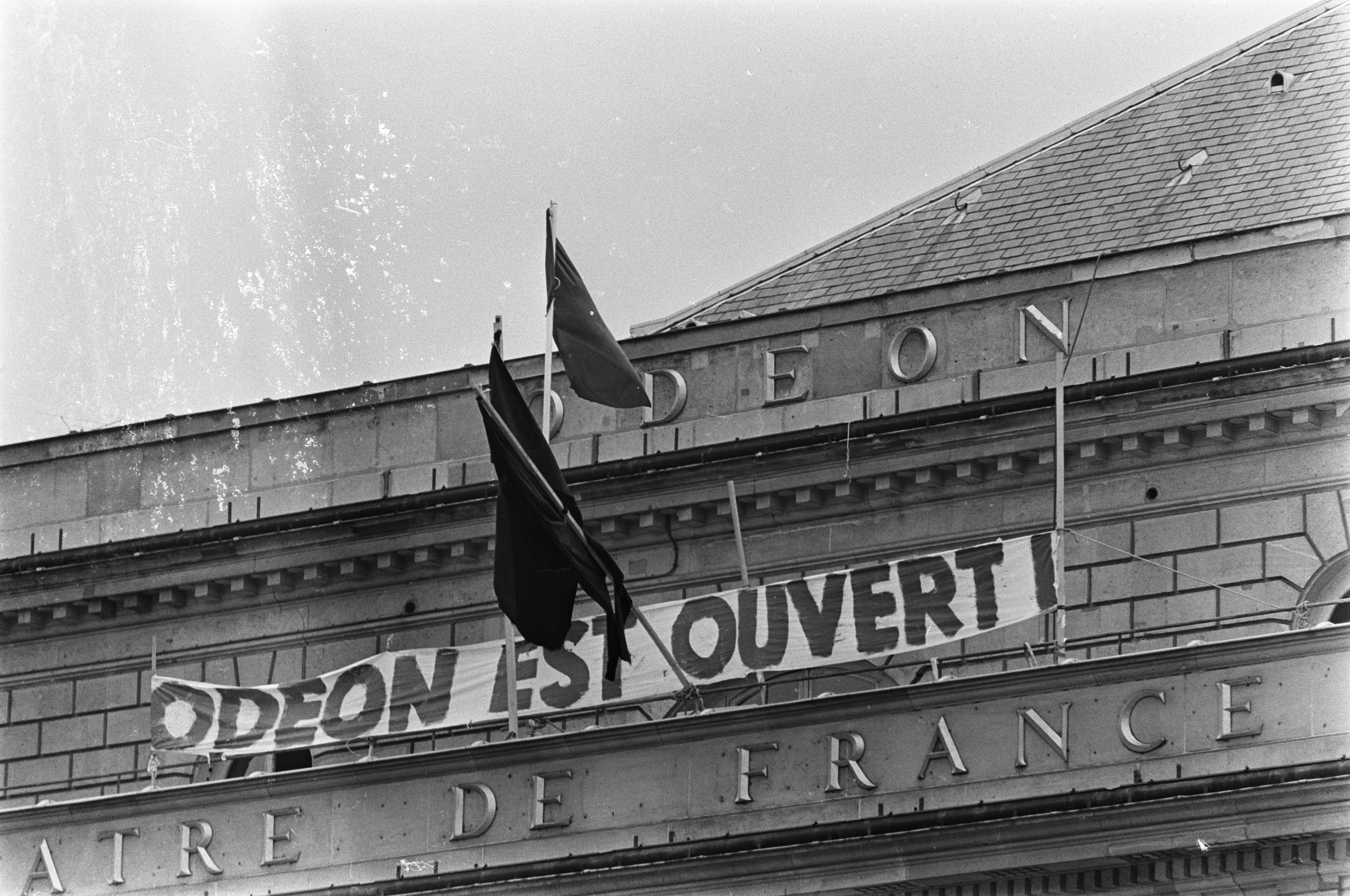 Collectie / Archief : Fotocollectie Anefo Reportage / Serie : [ onbekend ] Beschrijving : Stakingen in Frankrijk Datum : 21 mei 1968 Locatie : Frankrijk Trefwoorden : STAKINGEN Fotograaf : Koch, Eric / Anefo Auteursrechthebbende : Nationaal Archief Materiaalsoort : Negatief (zwart/wit) Nummer archiefinventaris : bekijk toegang 2.24.01.05 Bestanddeelnummer : 921-3744